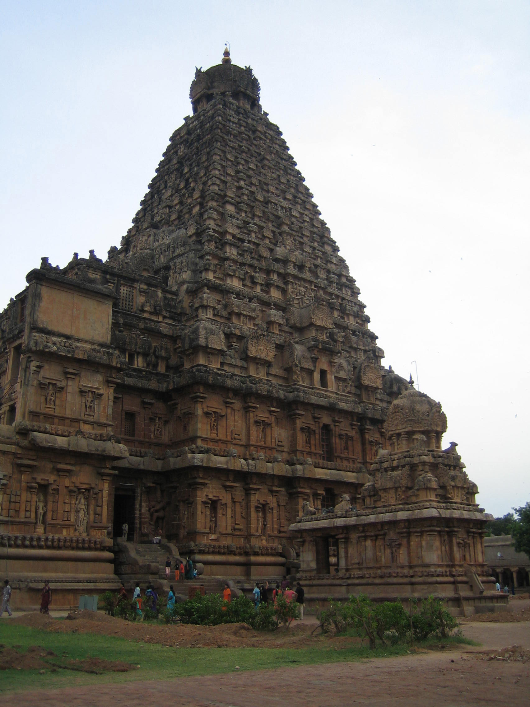 Thanjavur temple